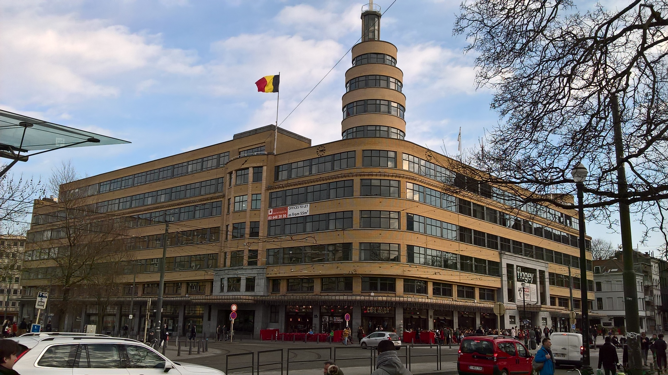 Centre culturel Flagey in Ixelles/Elsene, das ehemalige nationale Radiogebäude